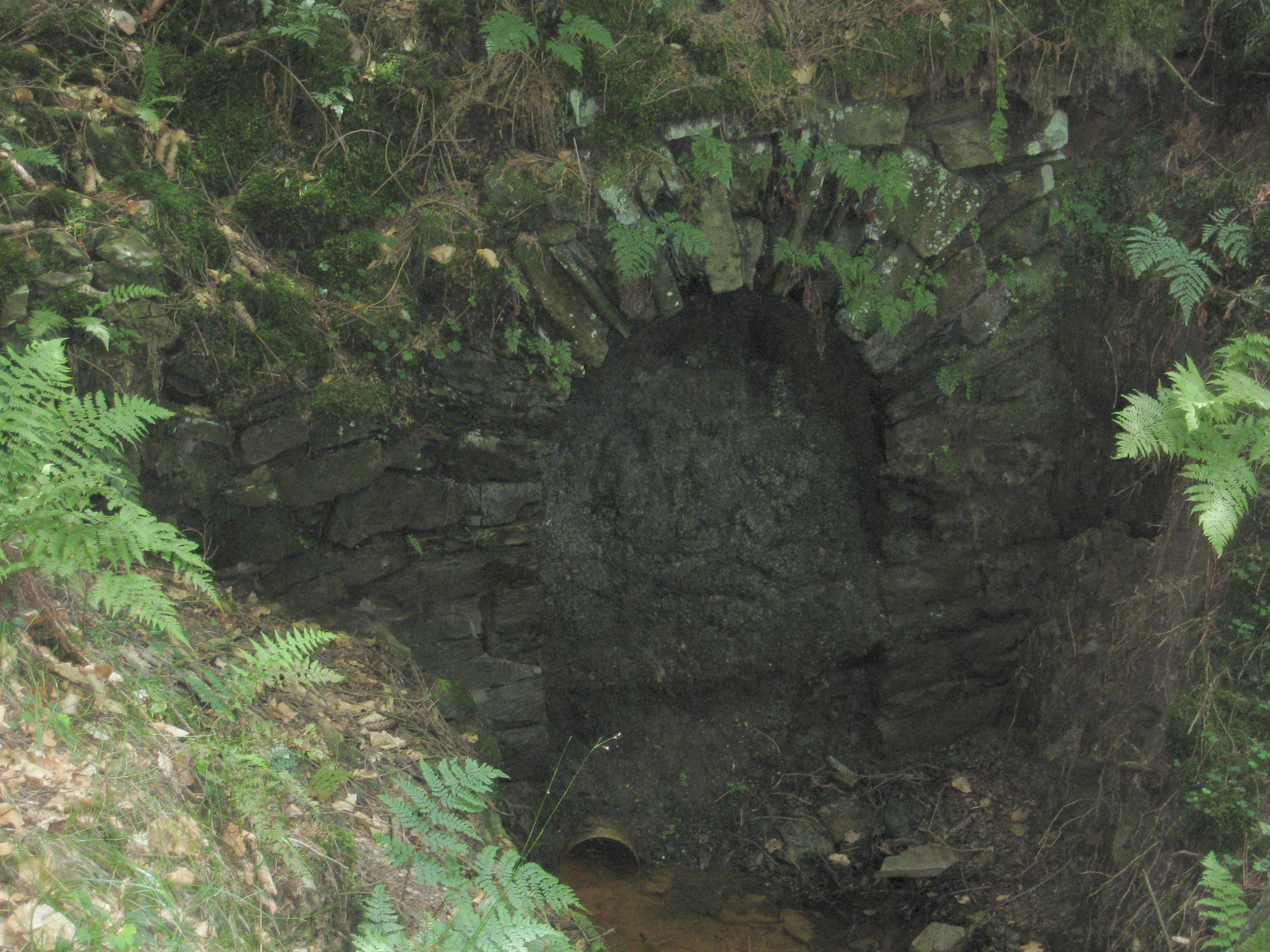 Verschlossener Stolleneingang der Grube Löwenstern am südlichen Hang der Kalteiche bei Wilnsdorf, Nordrhein-Westfalen (DE).